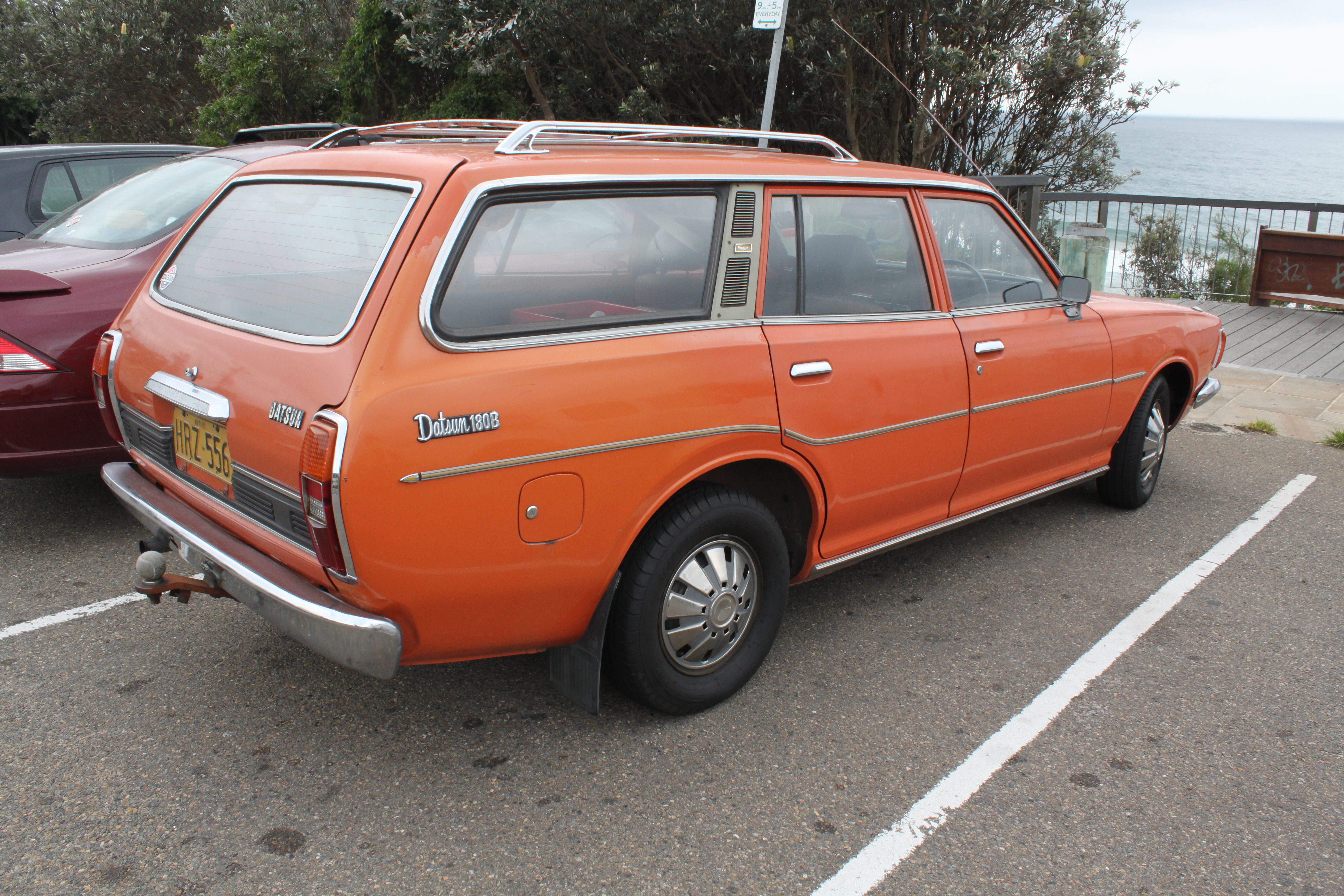 Datsun 180B 610 Wagon